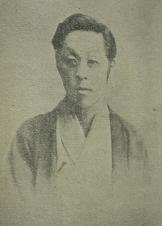 Kim Ok-kyun, in Japen